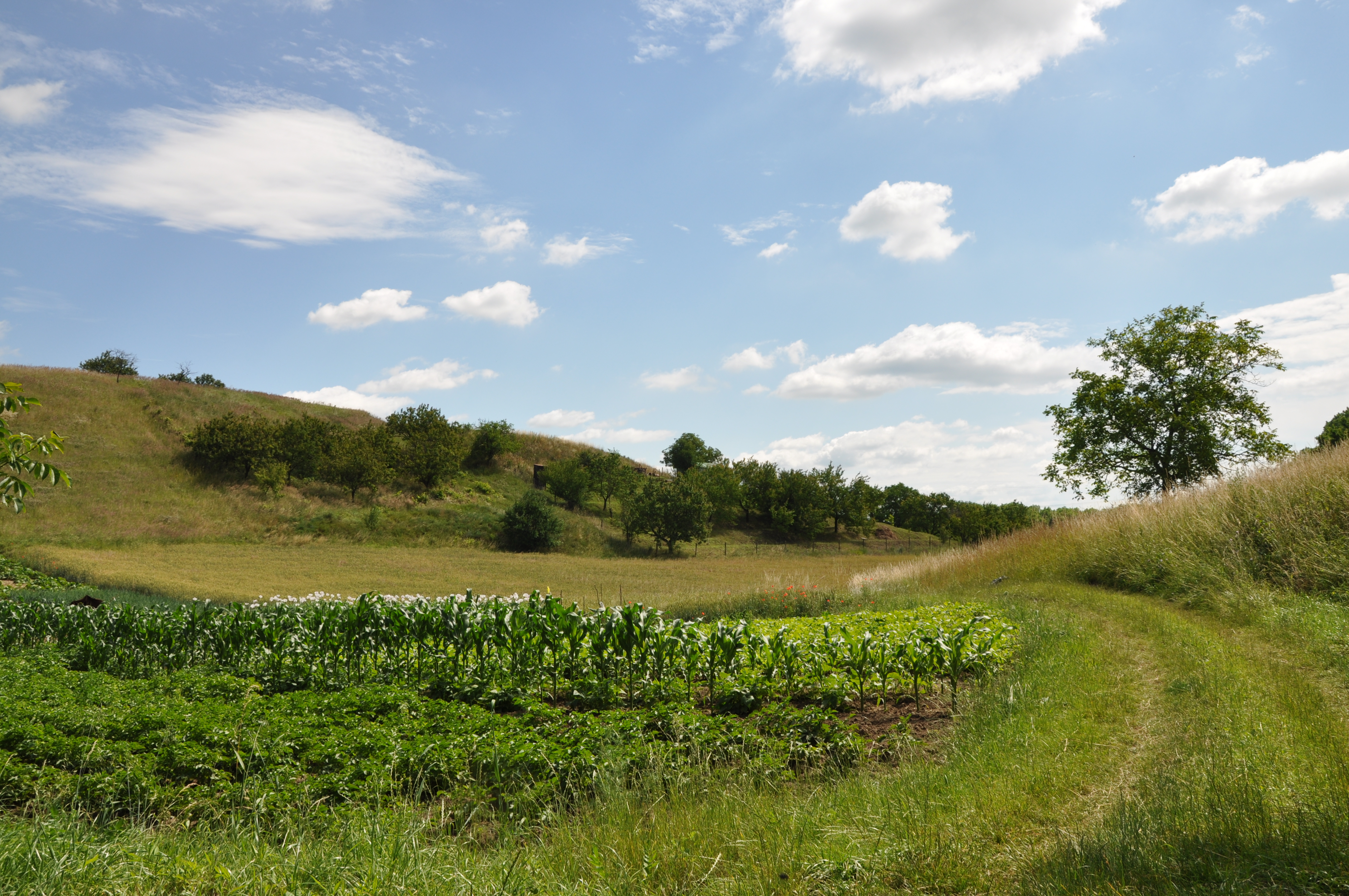 PR Špidláky, protější stráň